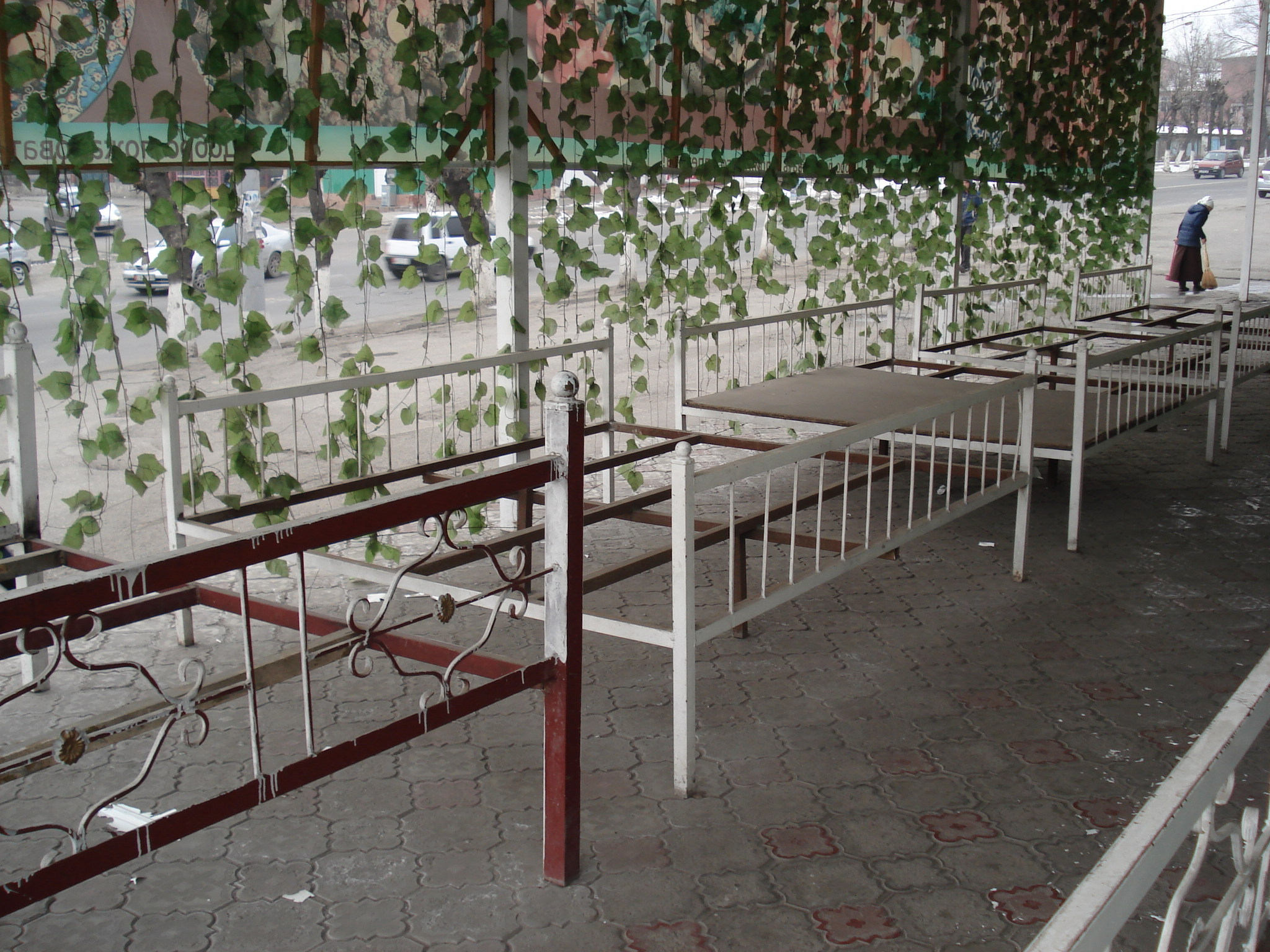 двухбортные металлические чарпаи